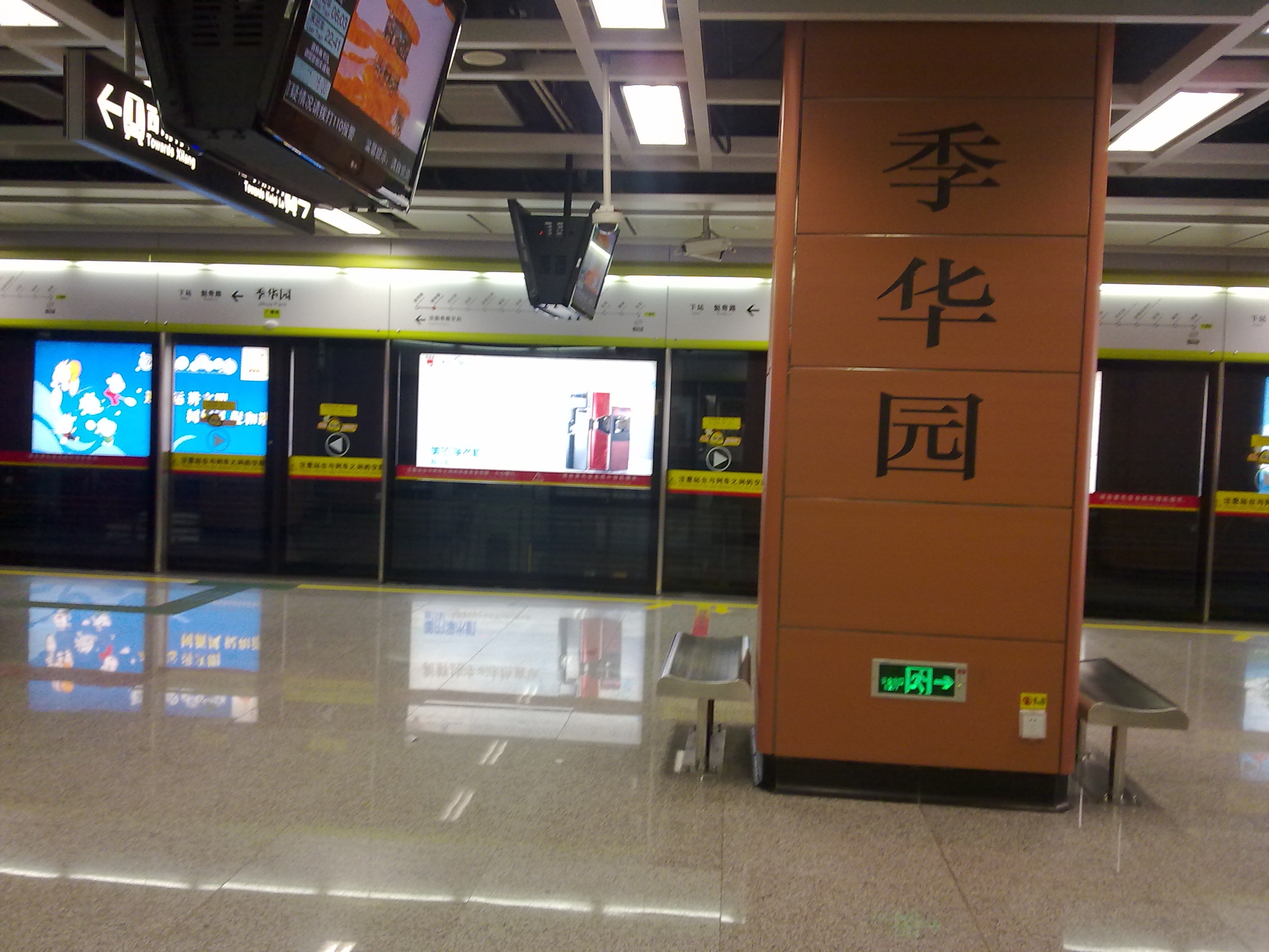 廣佛地鐵季華園站站台